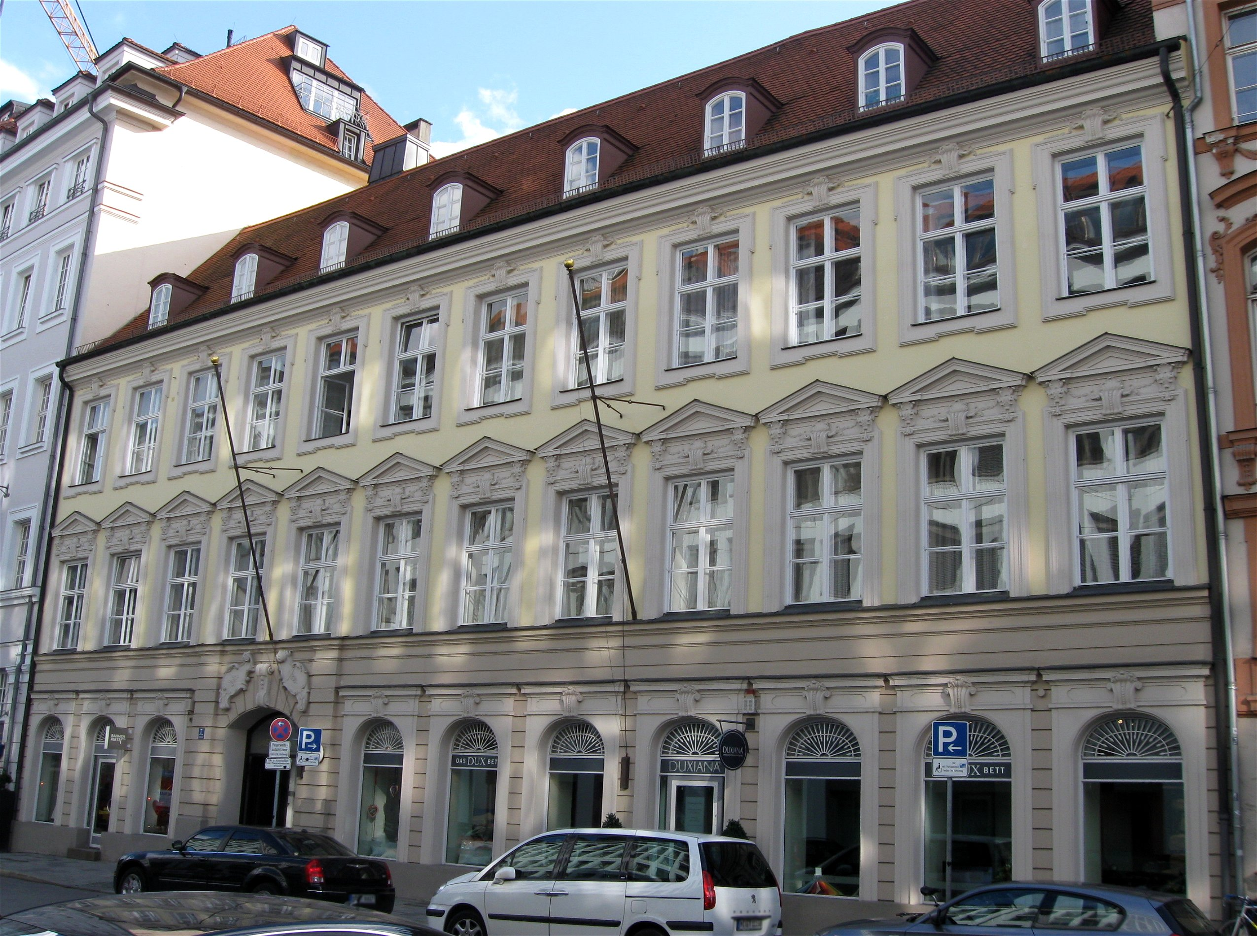 Prannerstraße 7; Ehem. Palais Graf Seinsheim, jetzt Bayerischer Städteverband, dreigeschossiger Satteldachbau mit reicher Stuckgliederung in frühklassizistischen Formen, ehem. zwei Häuser, um 1764/70 um- oder neugebaut, Umbau beider Häuser, von Josef Höchl, 1809, nach Kriegszerstörung Wiederaufbau mit einheitlich nach Westen verlängerter Palastfassade, durch Herbert Landauer, 1949.